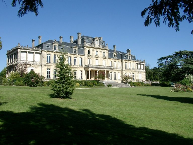 Le Château du Bourran de Mérignac (33 - France)